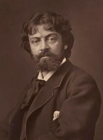 Portrait du Tragédien Mounet-Sully, Sociétaire de la Comédie-Française vers 1880